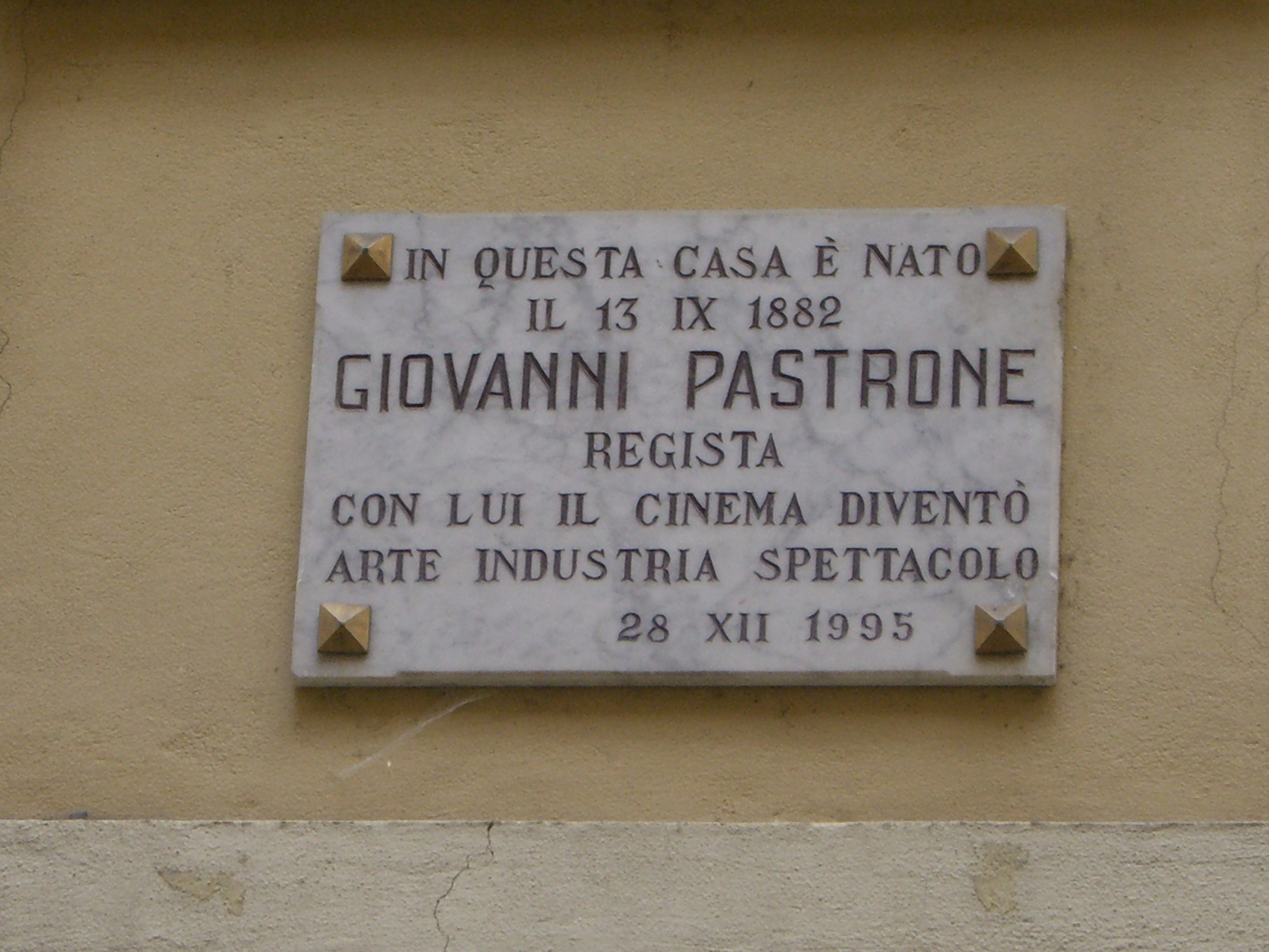 Lapide commemorativa sulla casa natale di Giovanni Pastrone, a Montechiaro d'Asti.